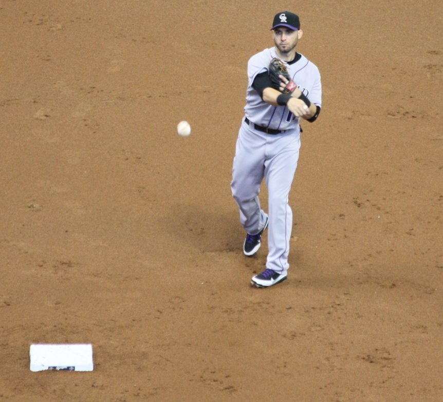 Colorado Rockies player Marco Scutaro.